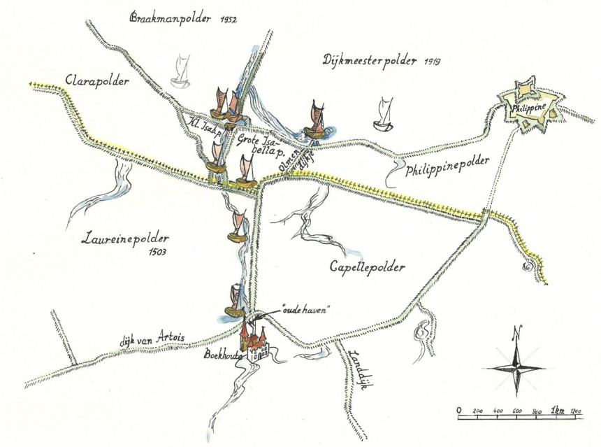 kaartje met aanduiding van de verschillende plaatsen waar de haven van Boekhoute gesitueerd was